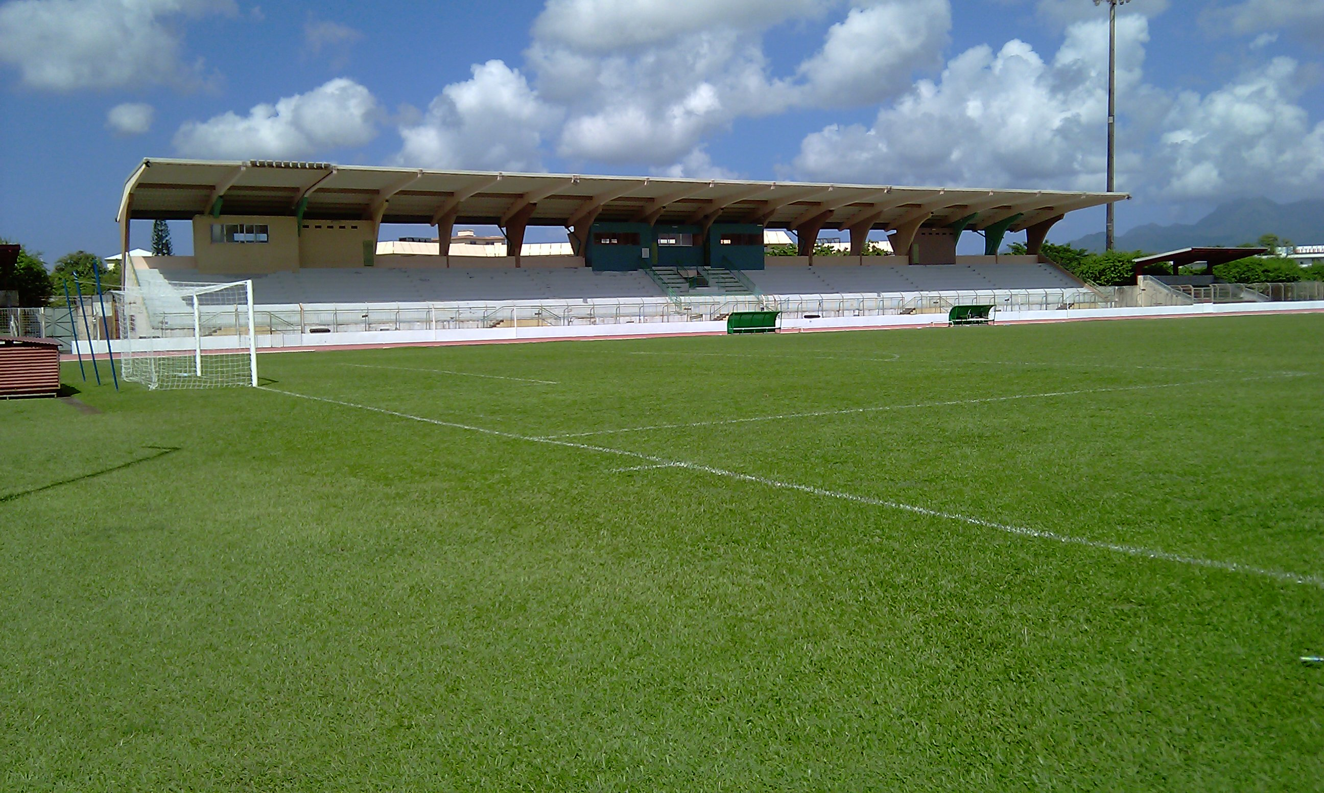 Le stade Georges Gratiant situé au quartier Place d'Armes dans la commune du Lamentin en Martinique.